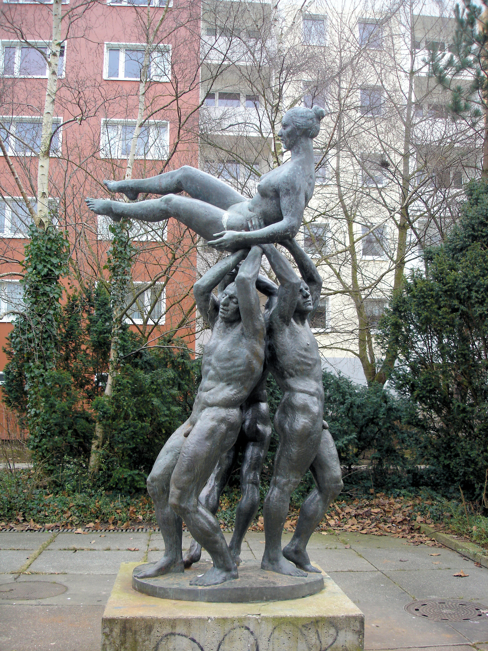 Bronzestatue "Der Friede bewahrt das Leben" Lichtenhäger Brink in Rostock